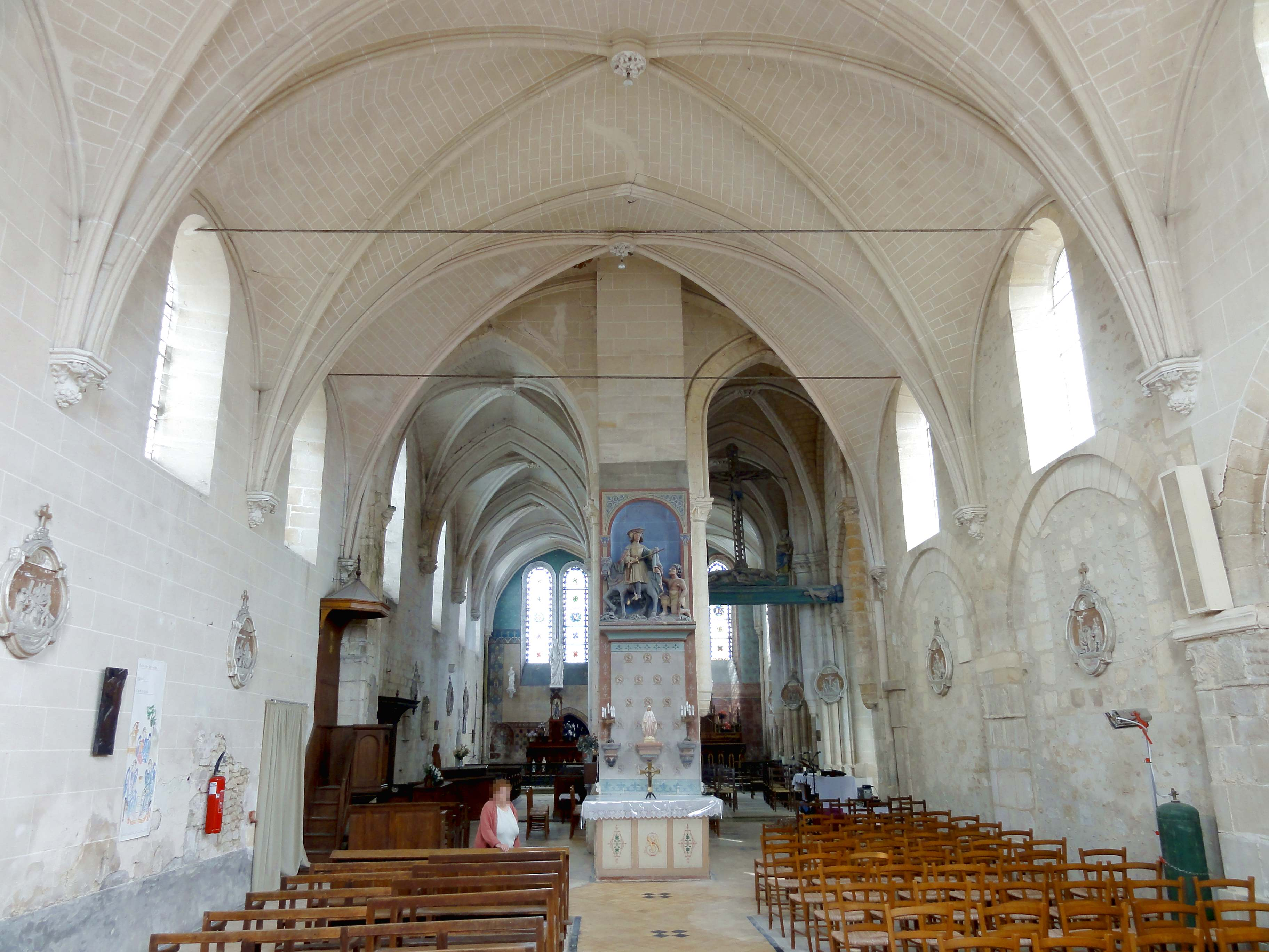 Intérieur de l'église - voir titre.